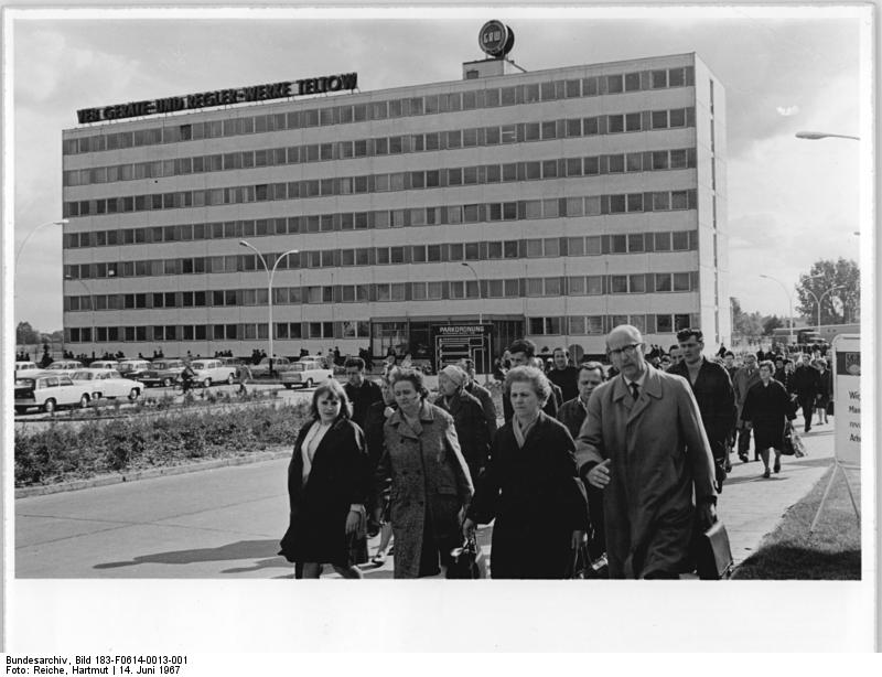 Teltow, Schichtwechsel, VEB Geräte- und Reglerwerke Zentralbild Reiche 14.6.1967 Volkswahlen 1967 Schichtende Die Arbeiter und Angestellten des VEB Geräte- und Reglerwerke Teltow haben ihren Arbeitstag beendet. Täglich rühren sie hier die fleißigen Hände. Zu den Volkswahlen 1967 wollen die werktätigen mit guten leistungen in der Planerfüllung vor die Wahlurne treten.